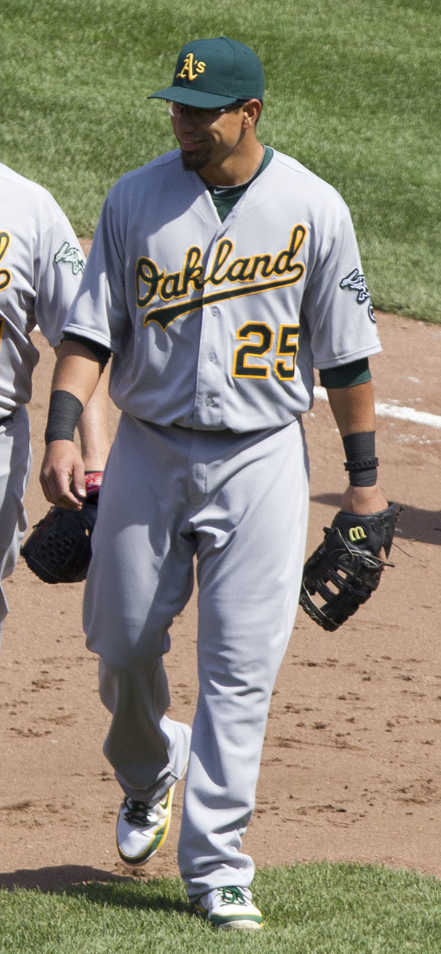 Kila Ka'aihue